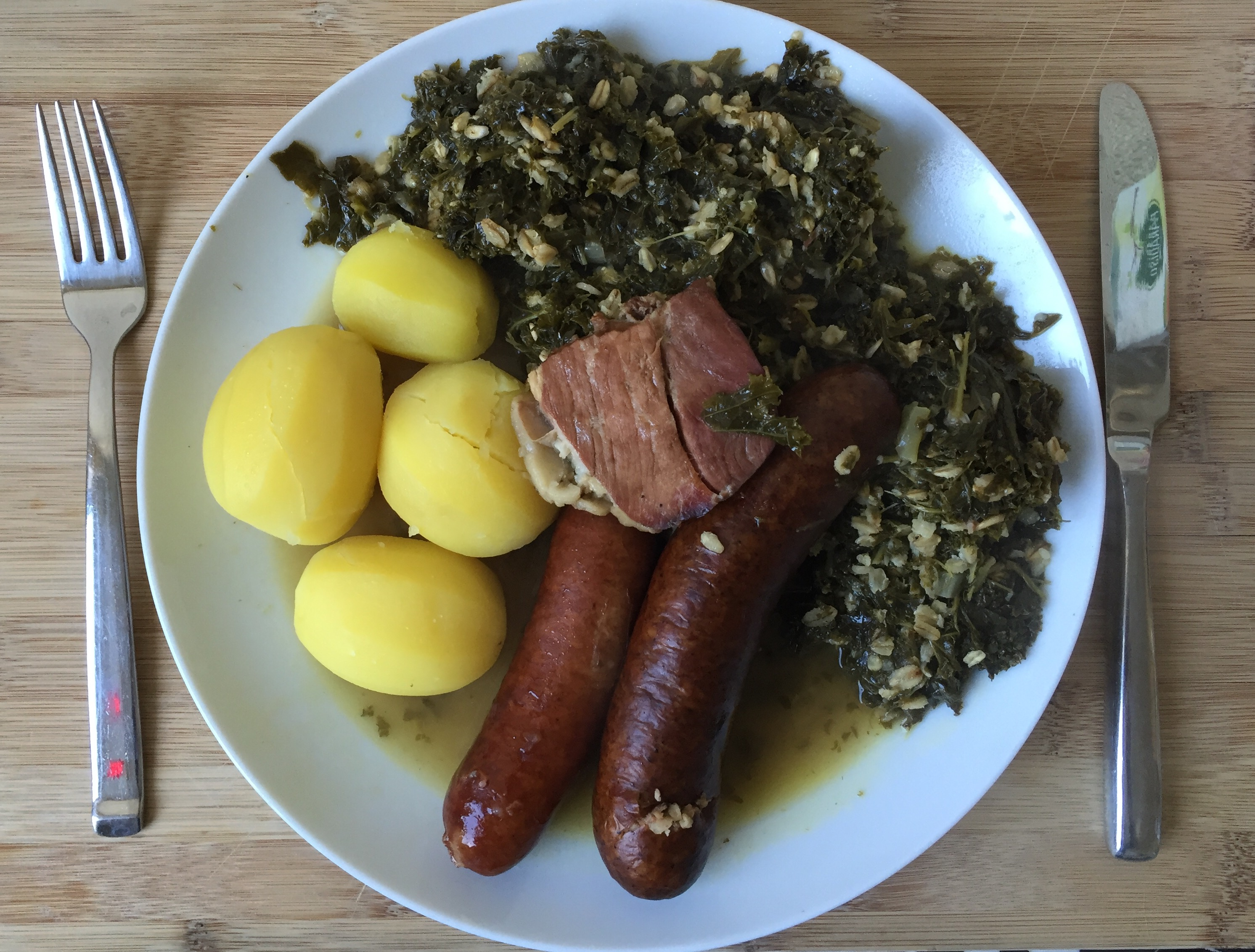 Ostfriesischer Grünkohl mit duchwachsenem Speck, Mettwurst und Pinkel